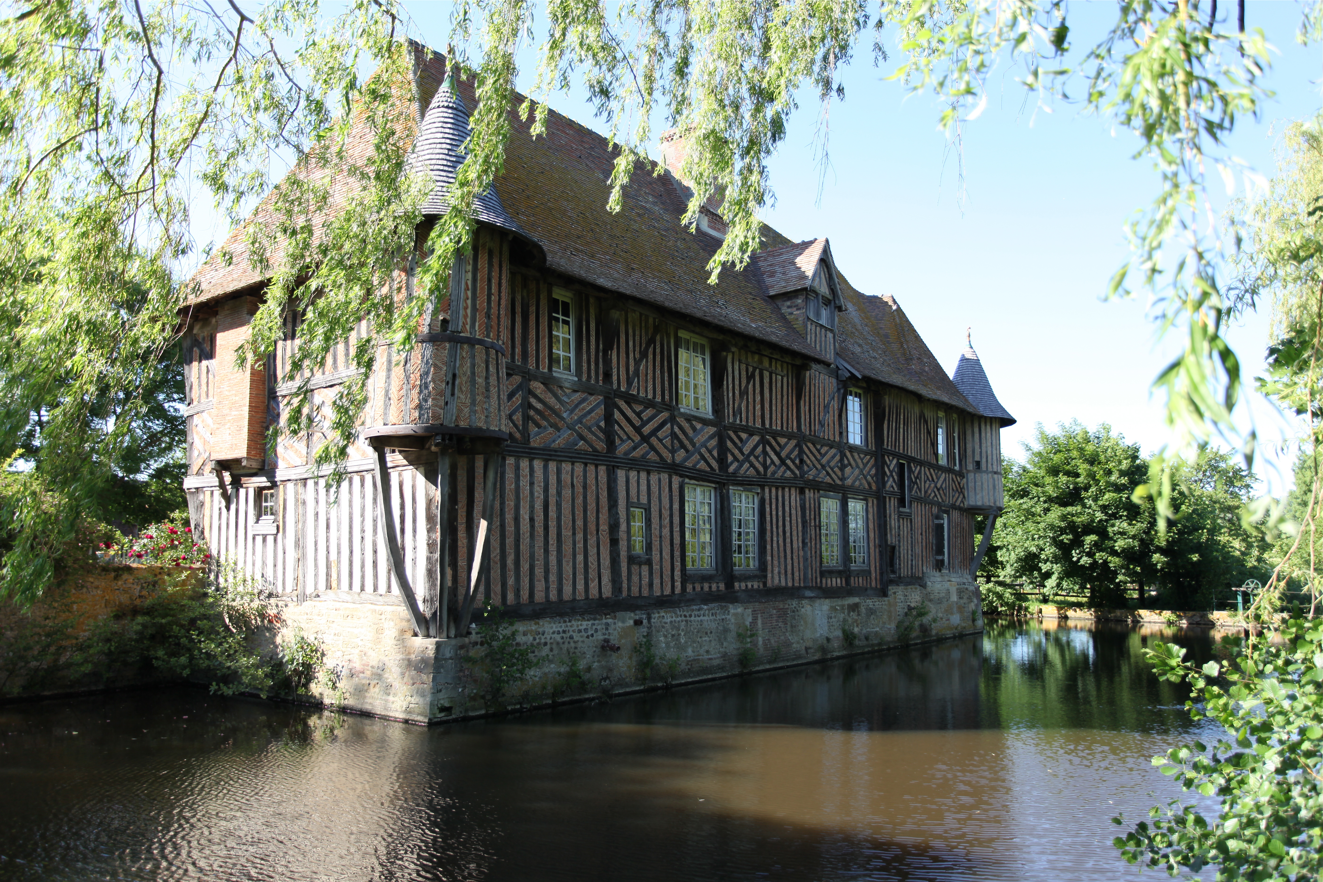 Manoir de Coupesarte, Calvados, France, vue depuis le Sud-Est, en direction du Nord-Ouest.